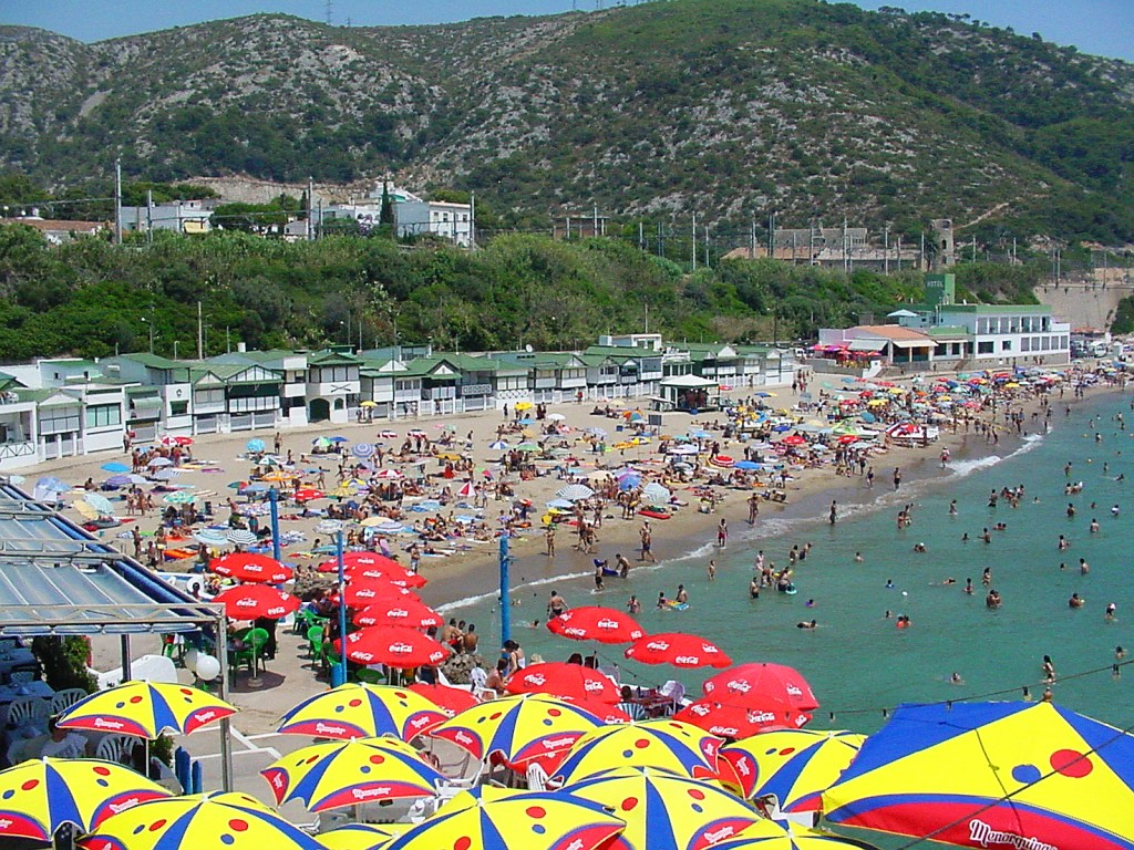 Playa de Garraf (Barcelona, España)